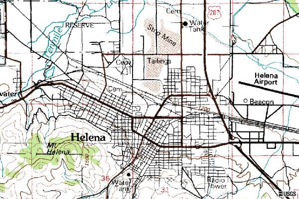 Karte Helena 1990